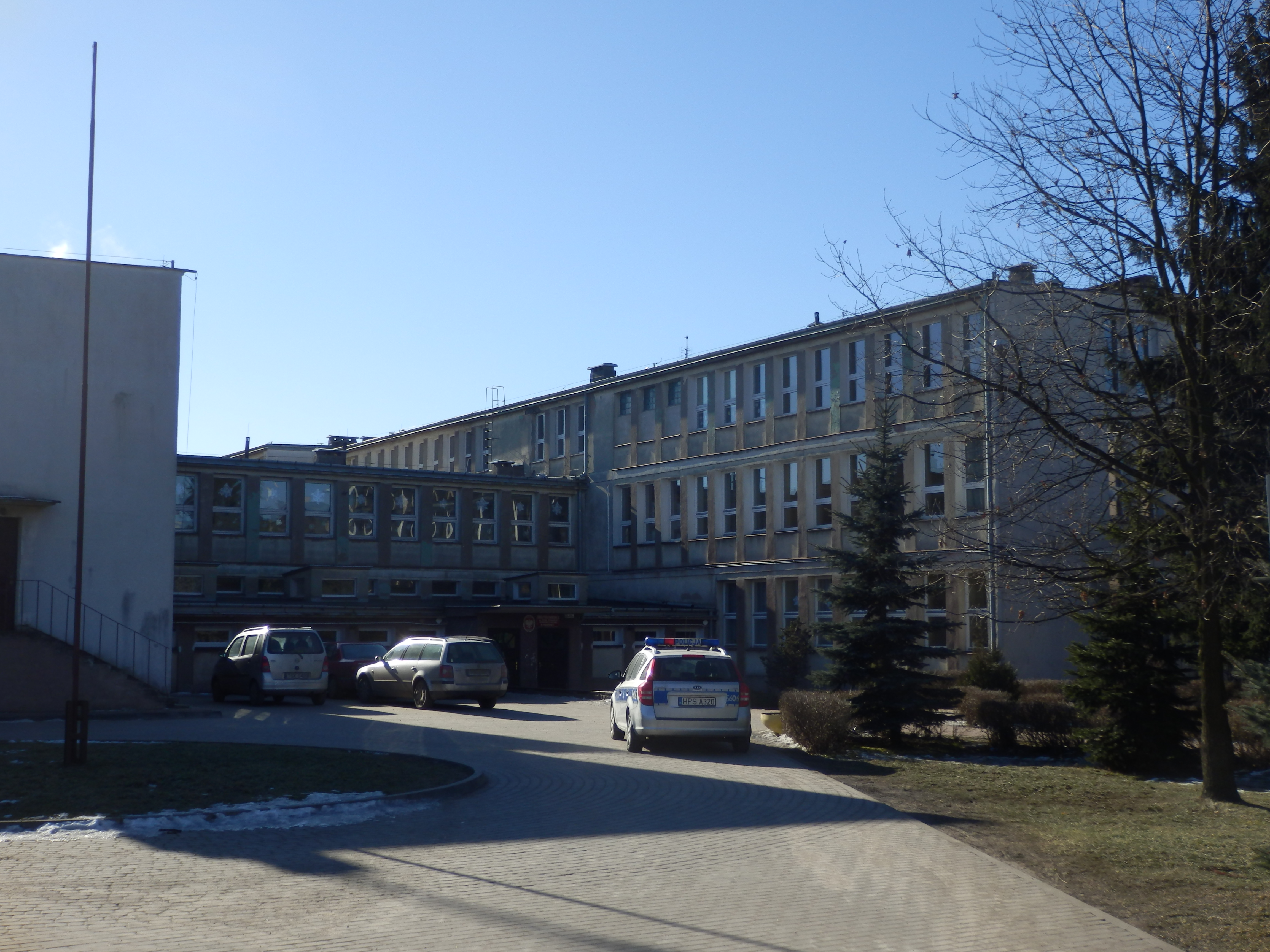 Szkoła Podstawowa nr 8 w Skarżysku-Kamiennej (osiedle Dolna Kamienna).